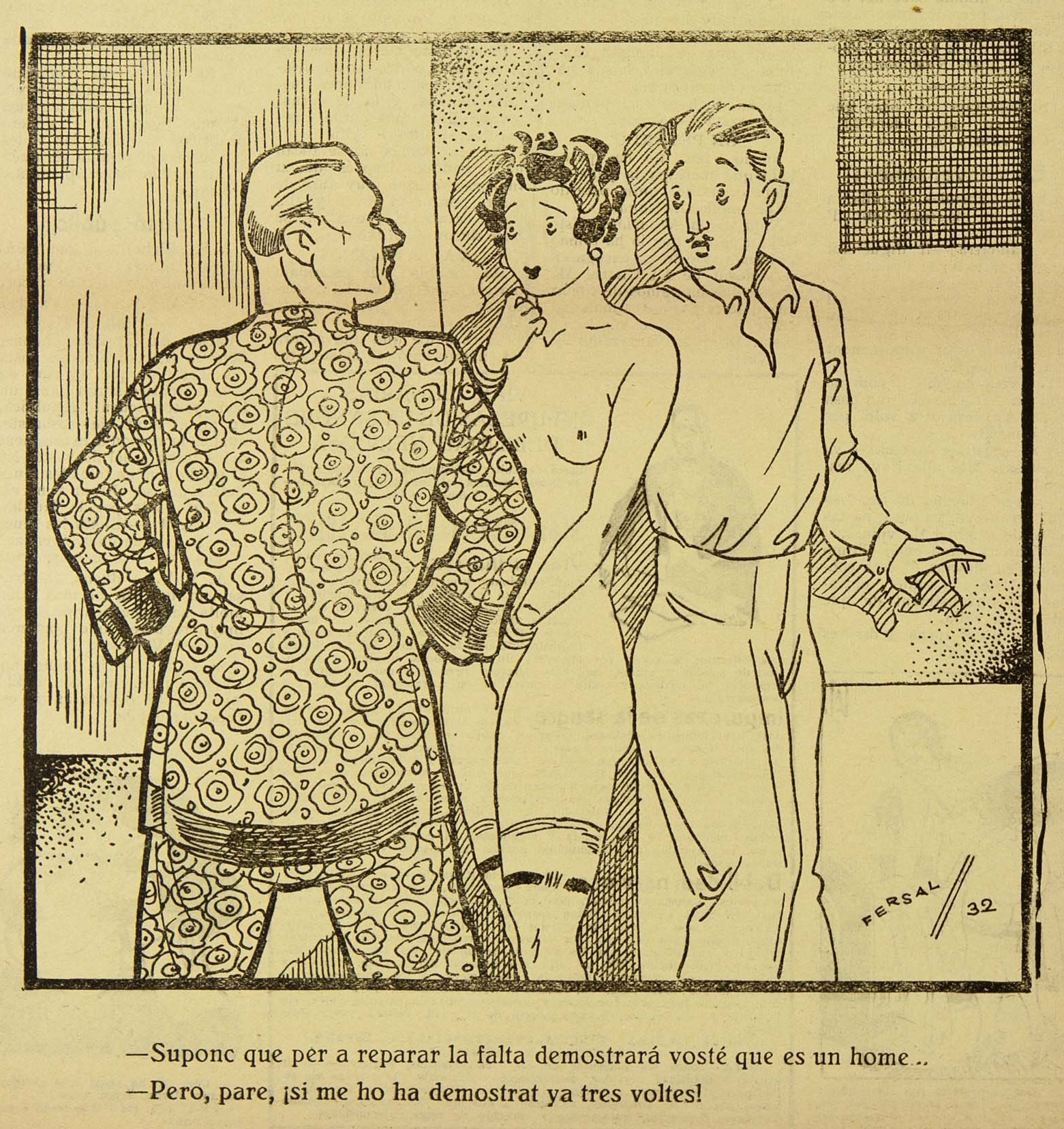 Acudit de Fersal a la contra de la Chala del 16 de febrer de 1932.